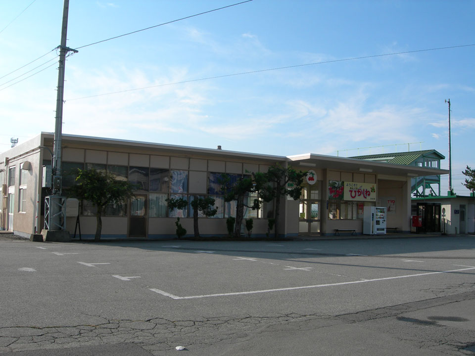 Higashine Station, Higashine, Yamagata, Japan